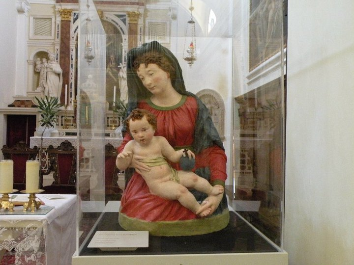 Madonna con Bambino, seconda metà del 500, Bottega veneta. Arcugnano